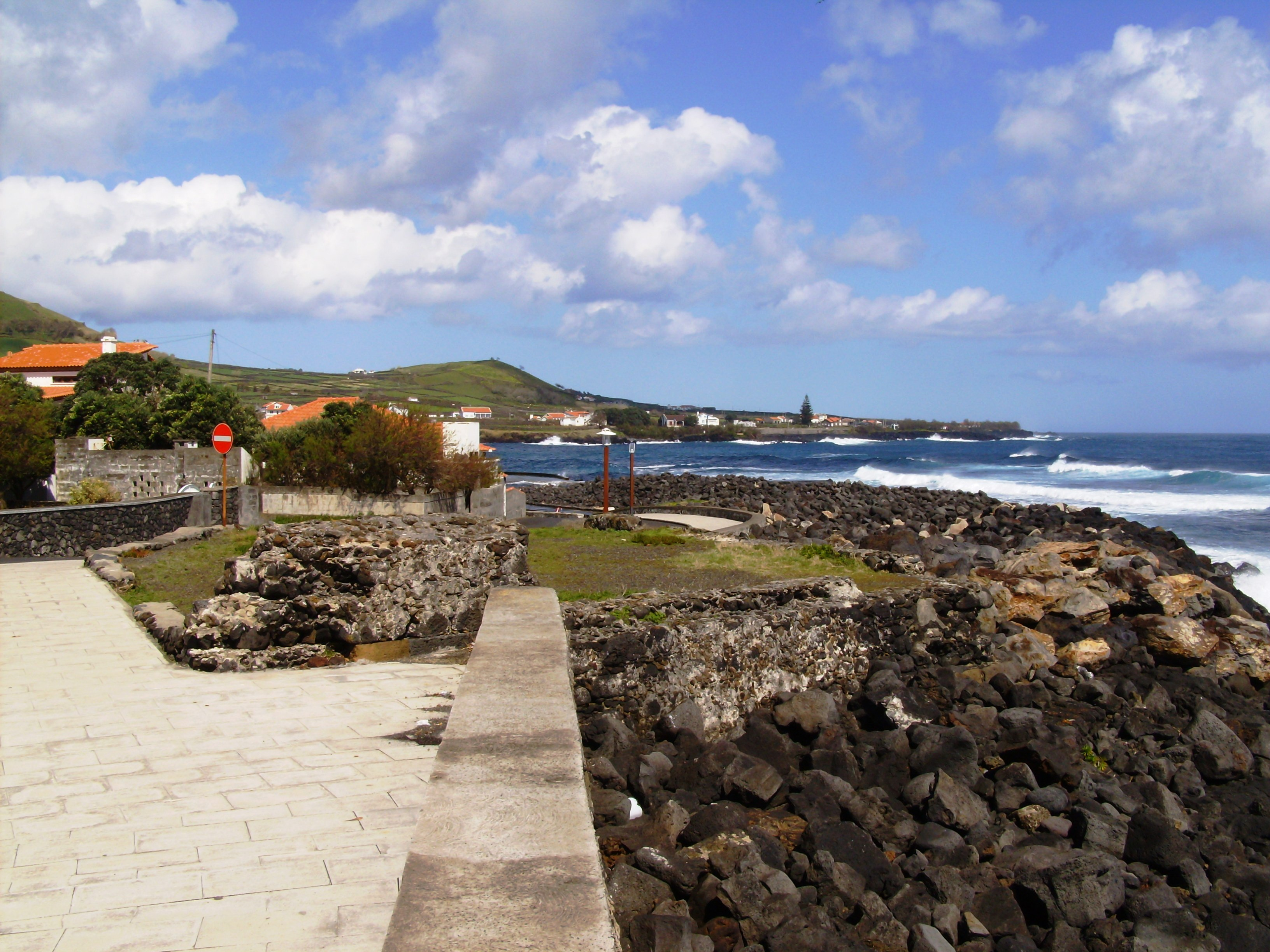 Forte de Nossa Senhora da Nazaré, Porto Martins, Praia da Vitória, Ilha Terceira, Açores: remanescentes.